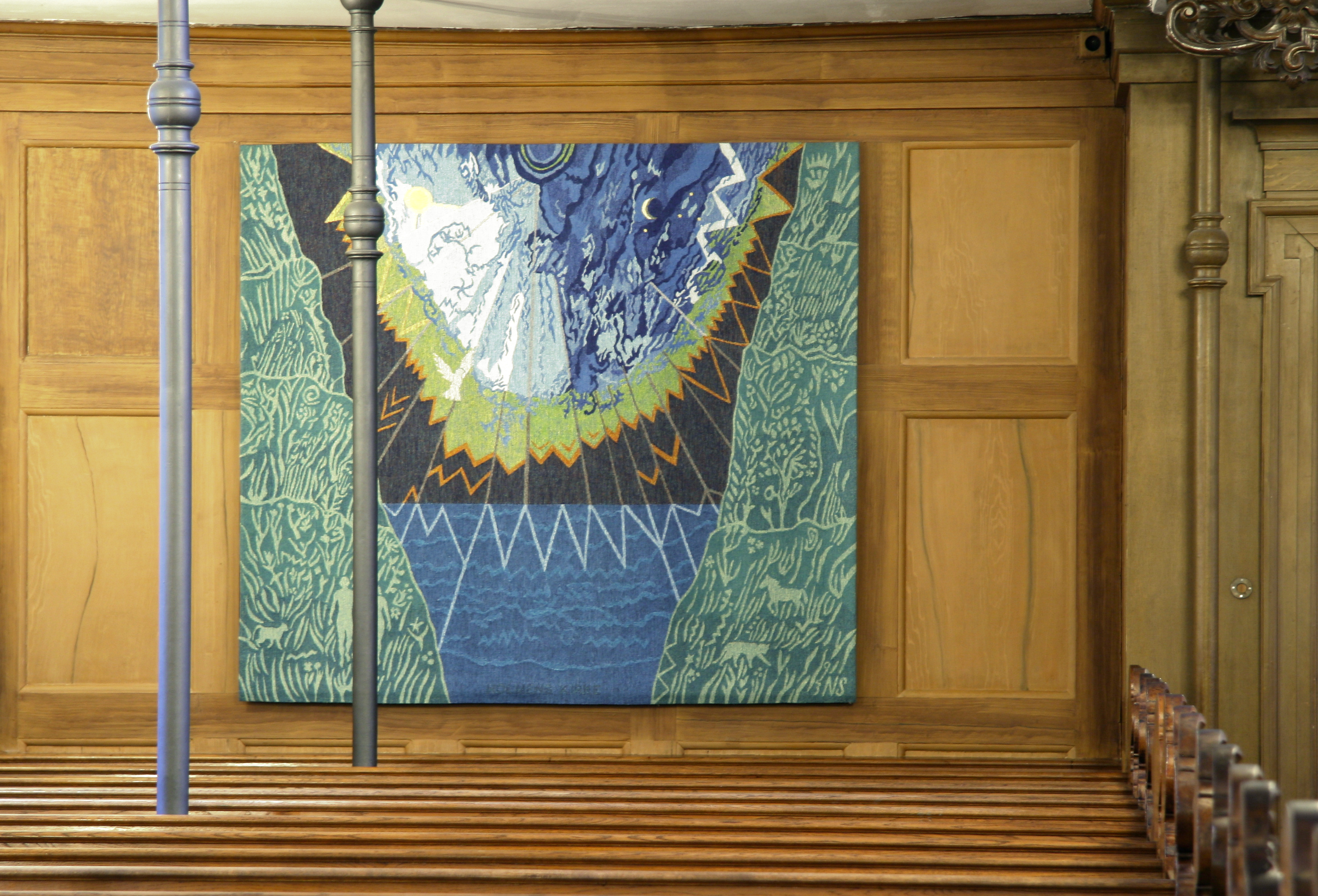 Holmens Kirke, Copenhagen, Denmark . Naja Saltos gobelin "Skabelsen" i Skippergangens østende.